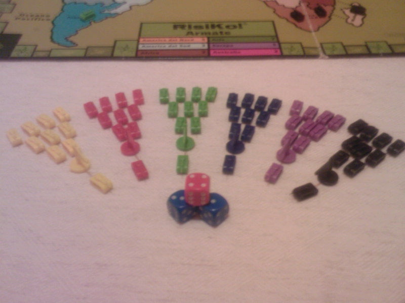 Esempio delle armate di RisiKo!